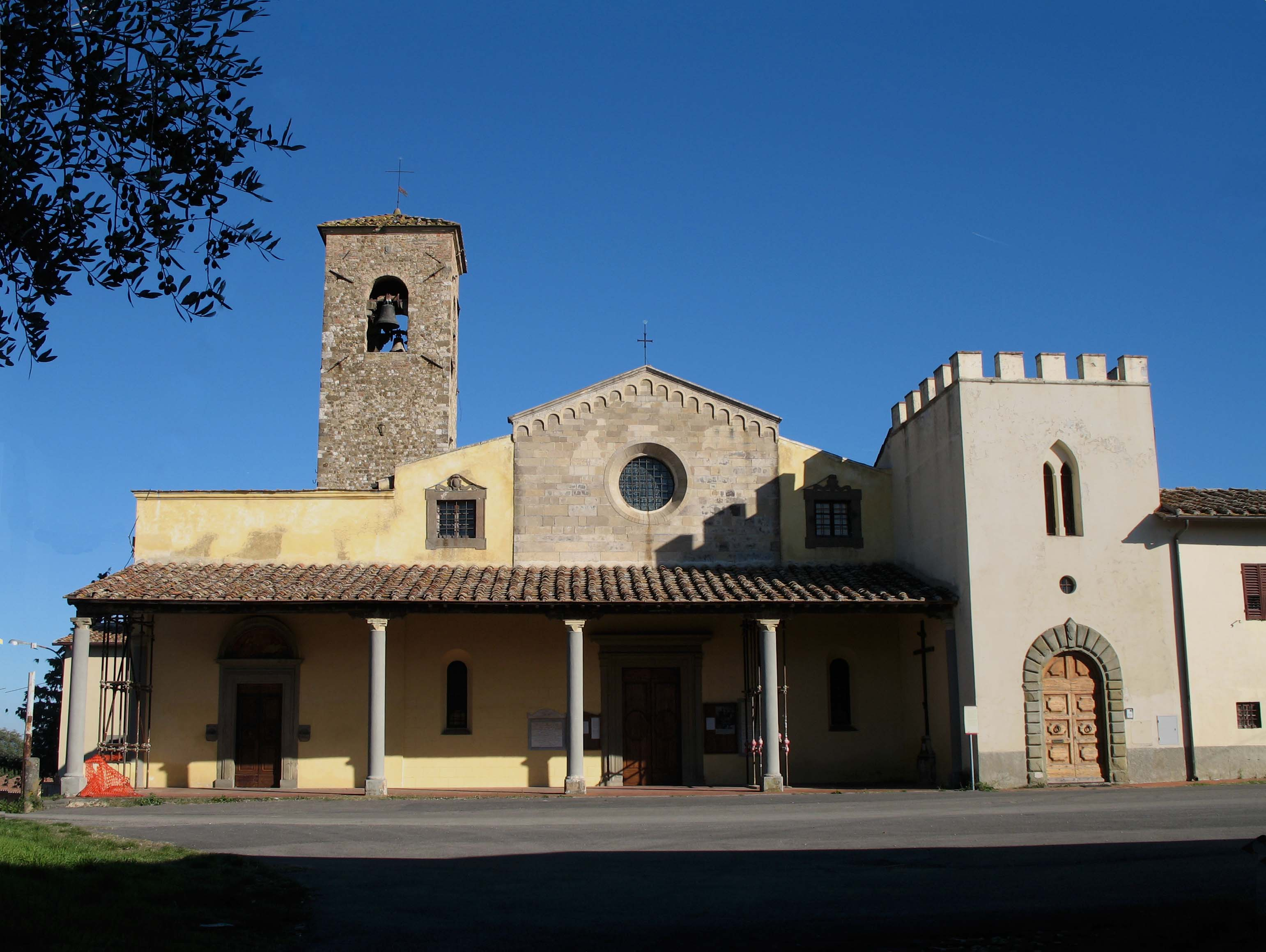 See title